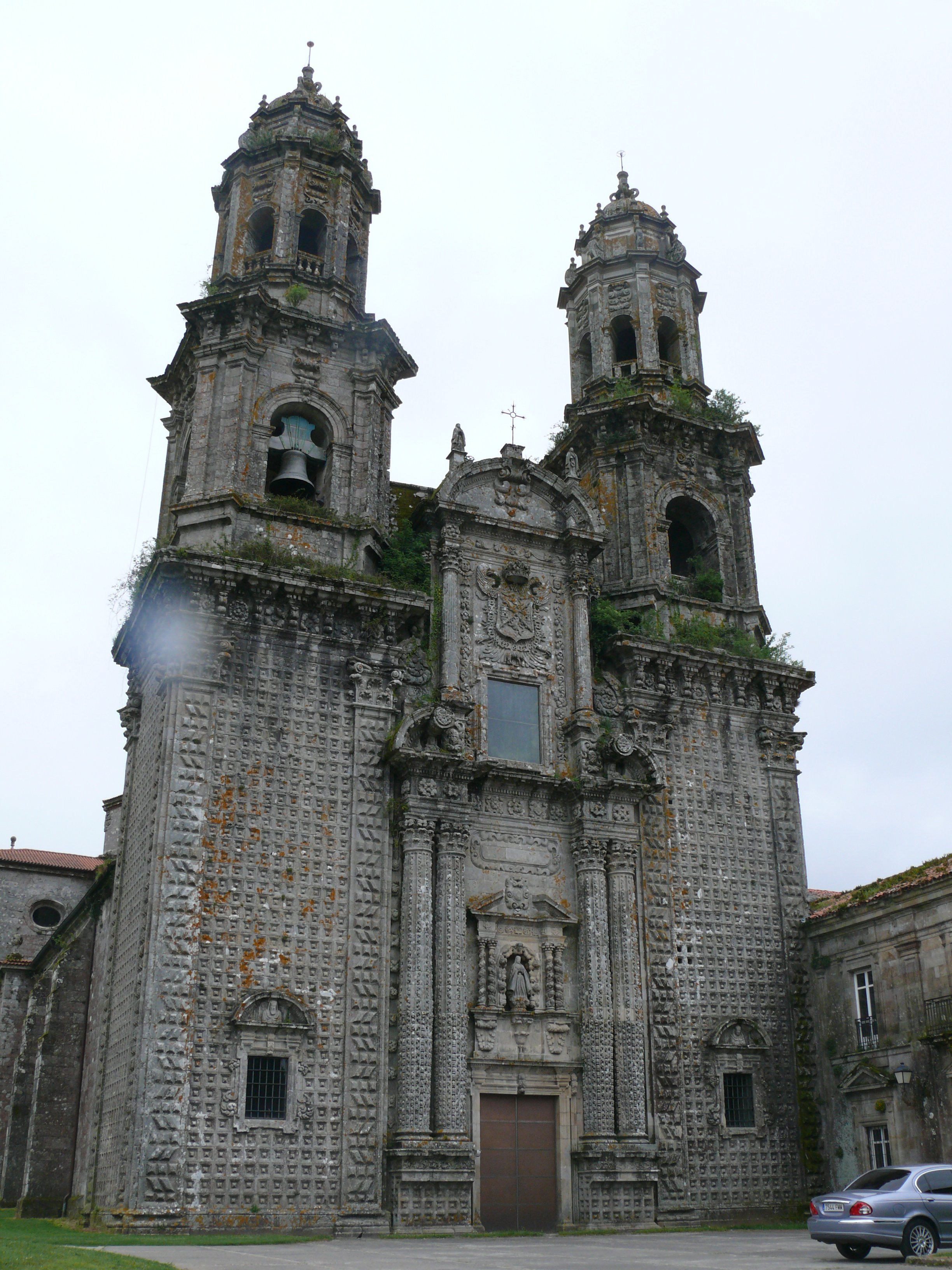 Fachada principal del Monasterio de Santa María de Sobrado, A Coruña, España.